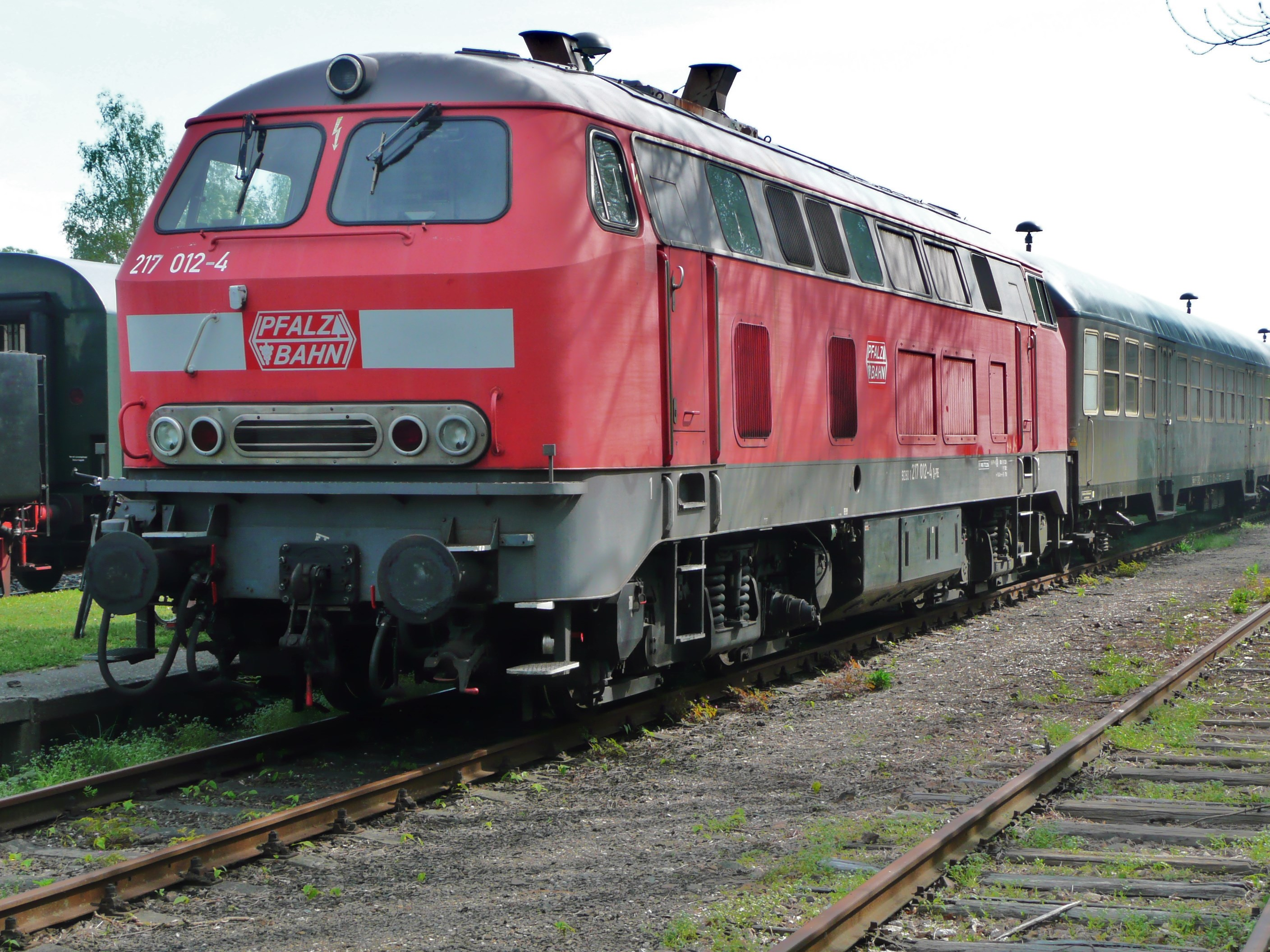 217 012 der Pfalzbahn beim Tag der Offenen Tür im Bahnbetriebswerk Nossen